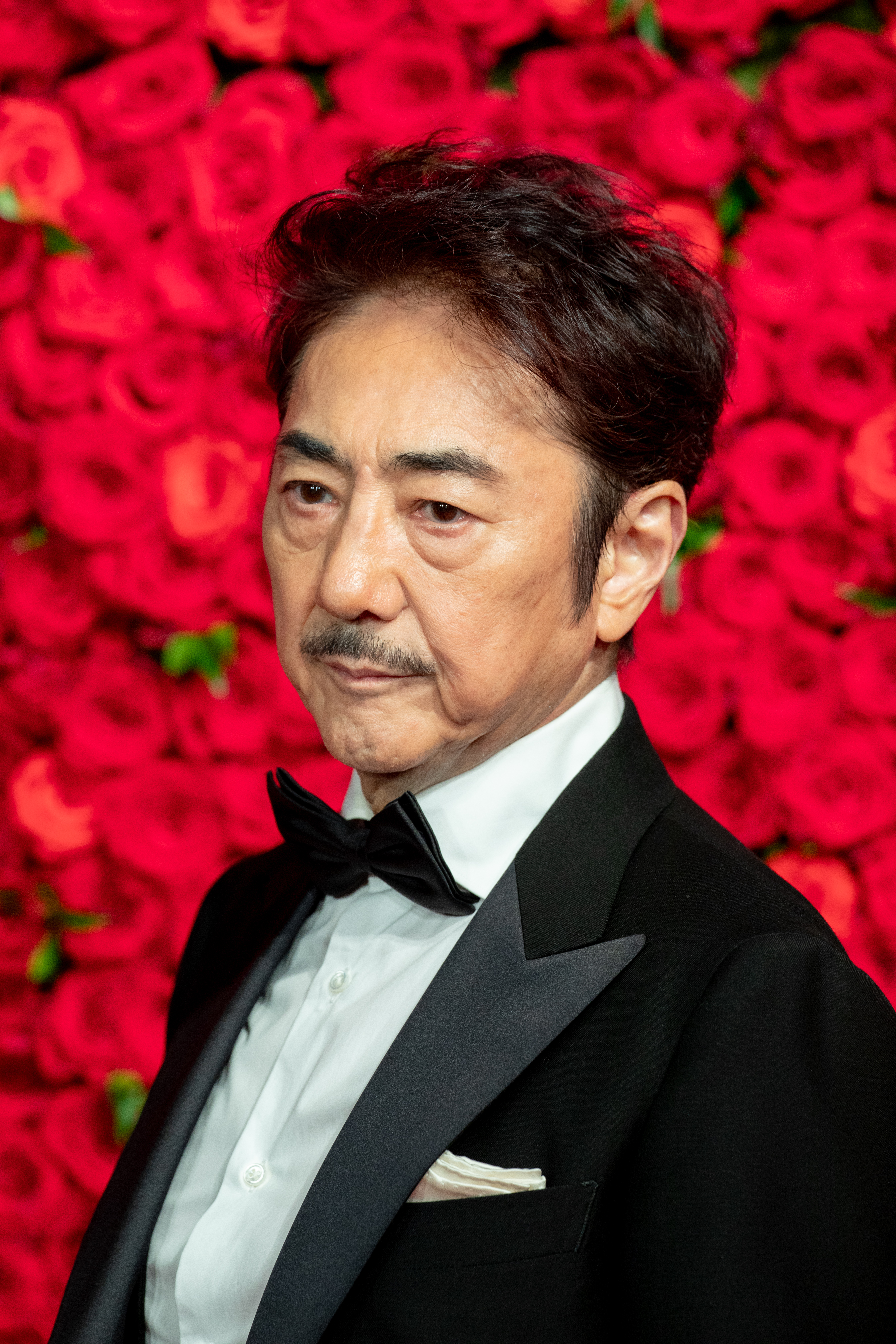 第30回 東京国際映画祭 オープニングセレモニー 市村正親 (Merry Christmas!～ロンドンに奇跡を起こした男～)